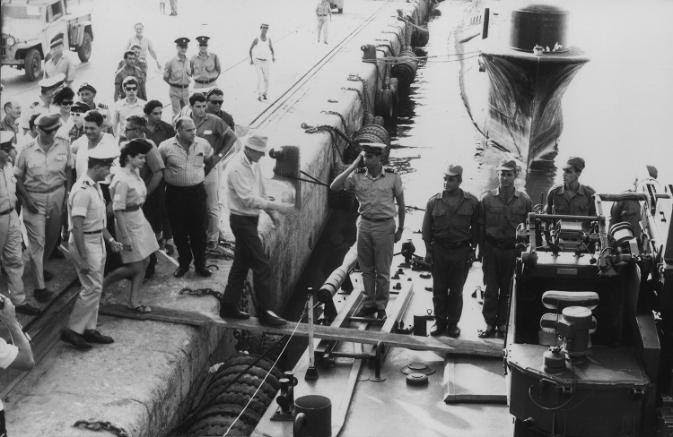 השחקן דני קיי מתקבל לביקור על הטרפדת ט 203